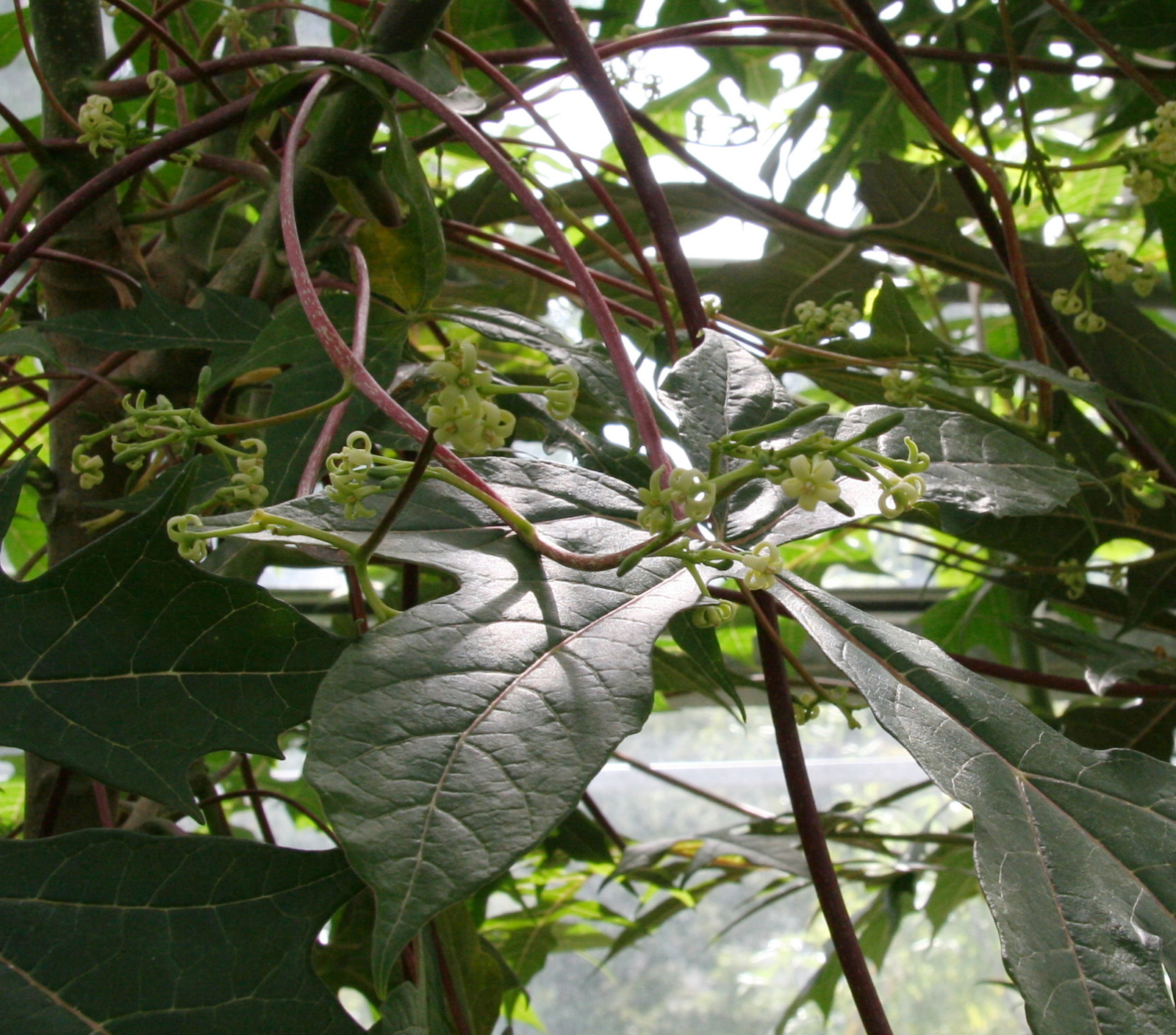 Carica monoica im Botanischen Garten Dresden